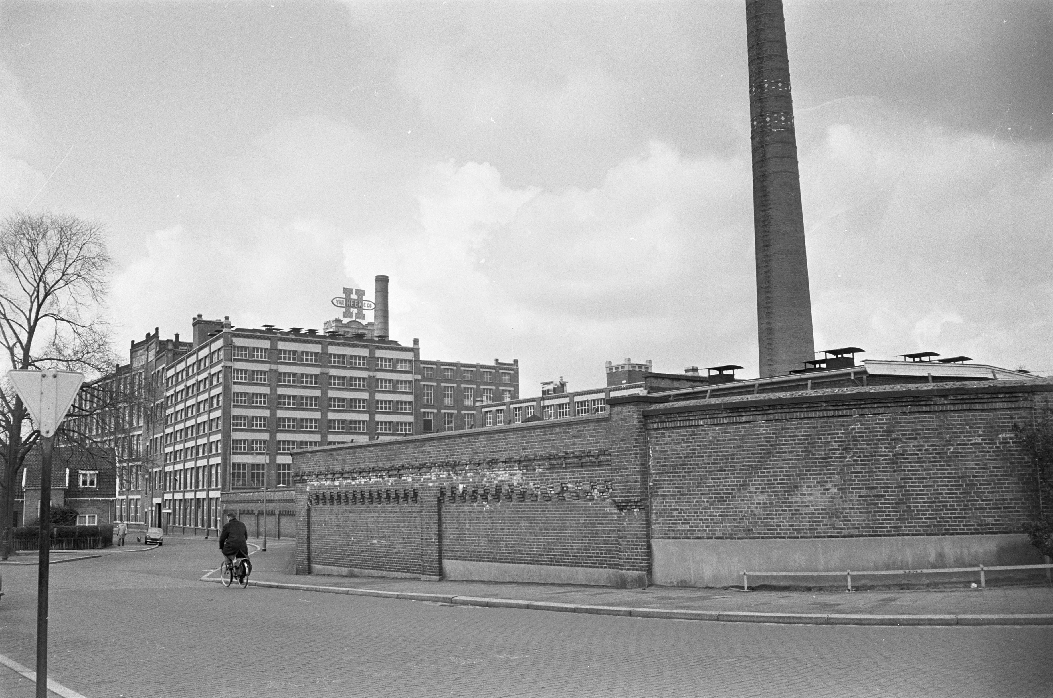 Collectie / Archief : Fotocollectie Anefo Reportage / Serie : [ onbekend ] Beschrijving : Ontslagen bij Van Heek in Enschede, de dochteronderneming Rigtersbleek, waar 700 man ontslagen werden Datum : 3 april 1967 Locatie : Enschede Trefwoorden : ONTSLAGEN Persoonsnaam : Heek van, Man Instellingsnaam : Rigtersbleek Fotograaf : Merk, Ben / Anefo Auteursrechthebbende : Nationaal Archief Materiaalsoort : Negatief (zwart/wit) Nummer archiefinventaris : bekijk toegang 2.24.01.05 Bestanddeelnummer : 920-2024